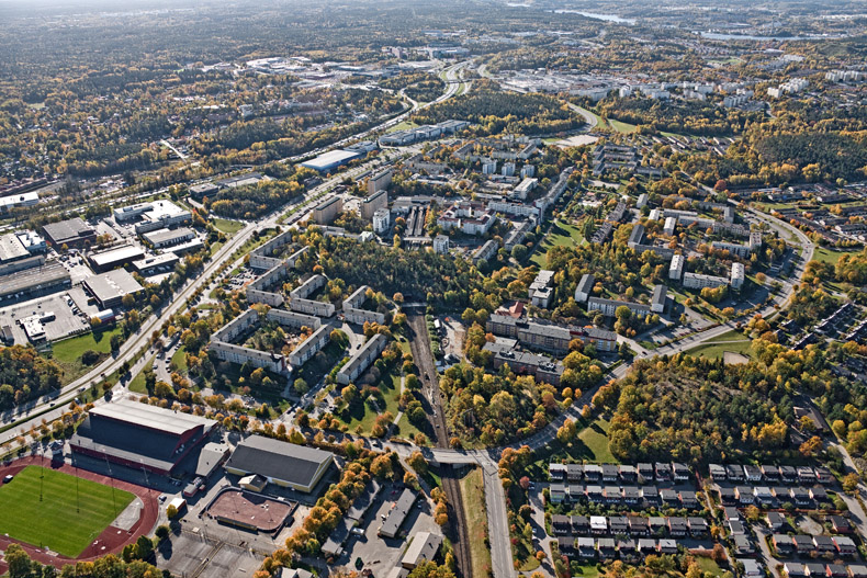 Sätra mot S. Skärholmsvägen till vänster. Motiv: Sätra Kategori: VägarSätra mot S. Skärholmsvägen till vänster.